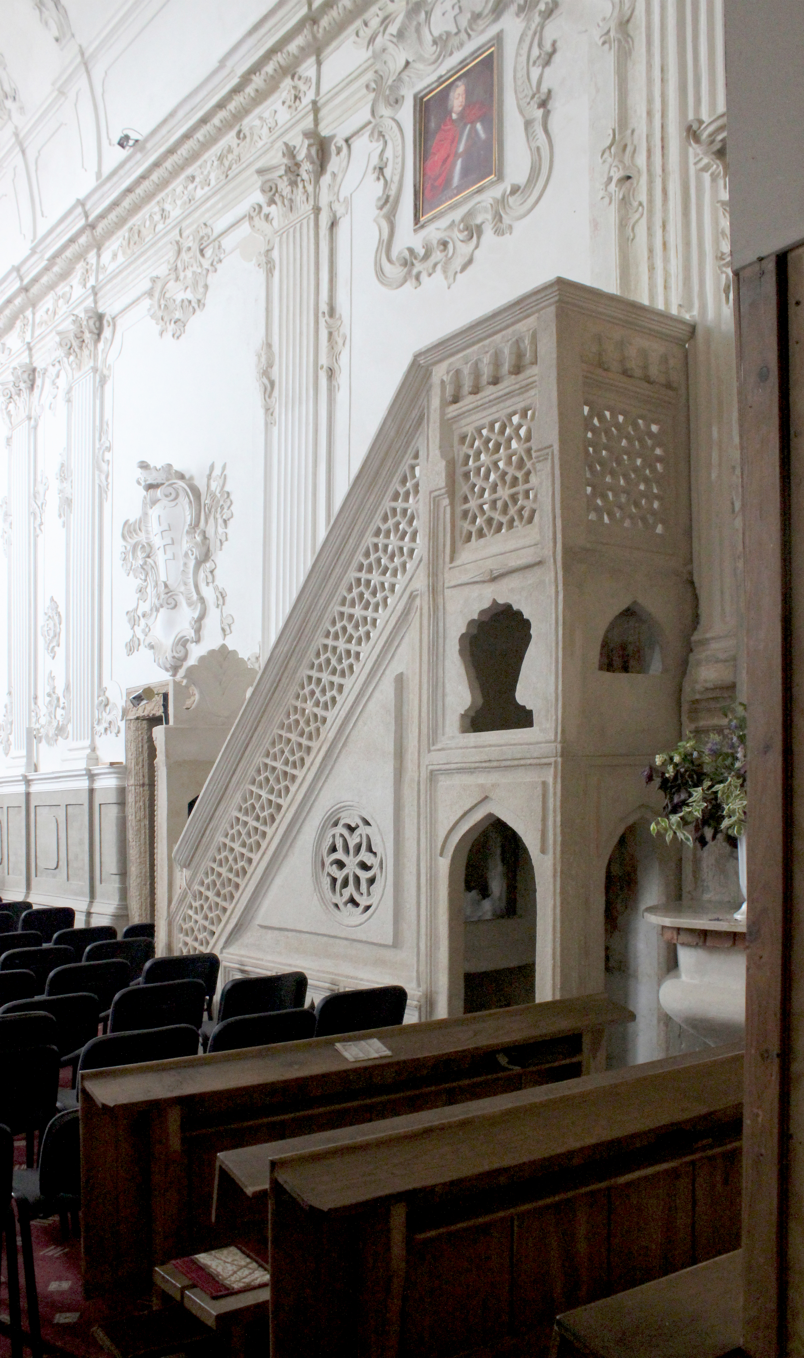 Костел домініканів з келіями, Кам'янець-Подільський, вул. Домініканська, 1